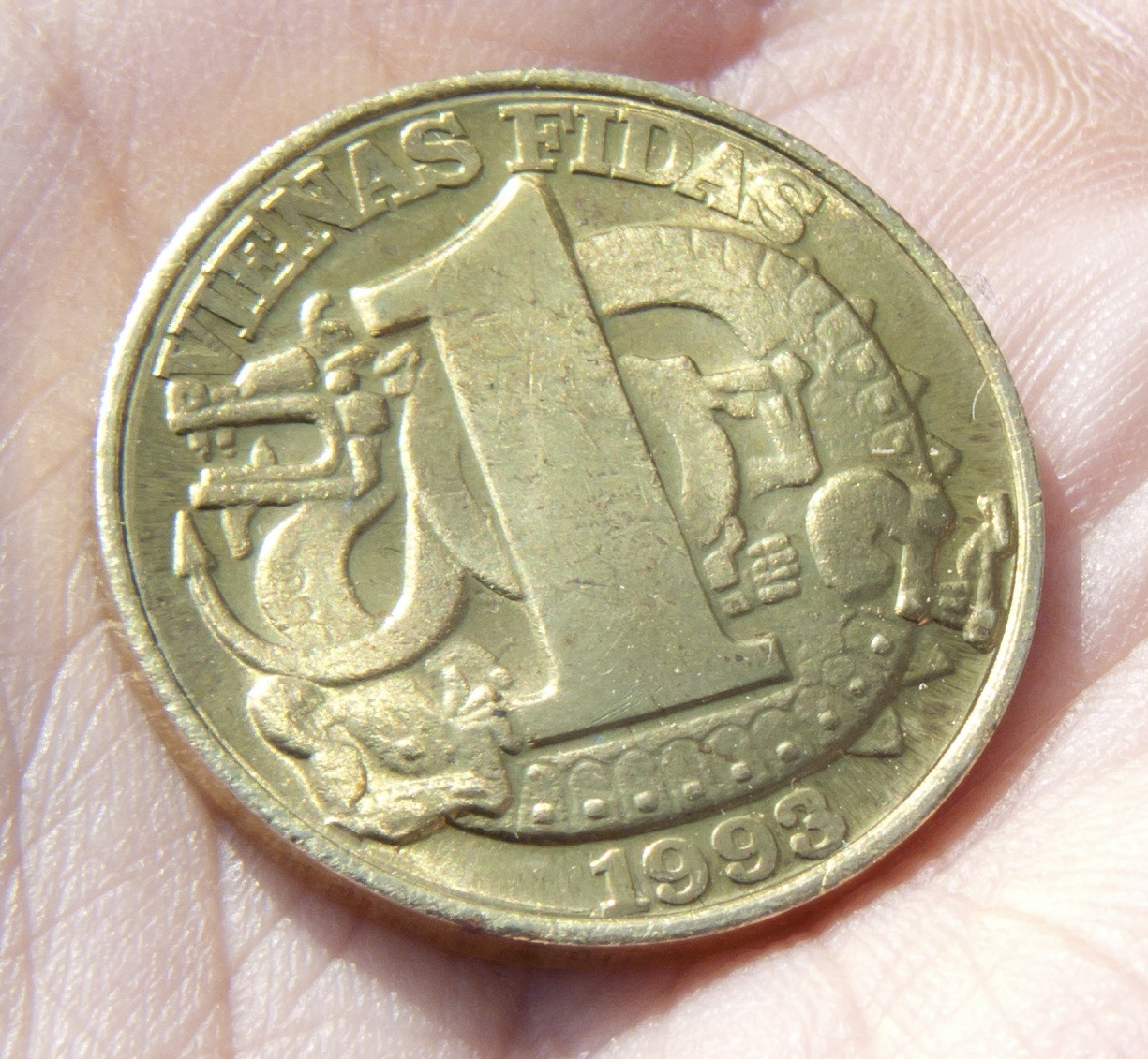 Pirmoji lietuviška moneta